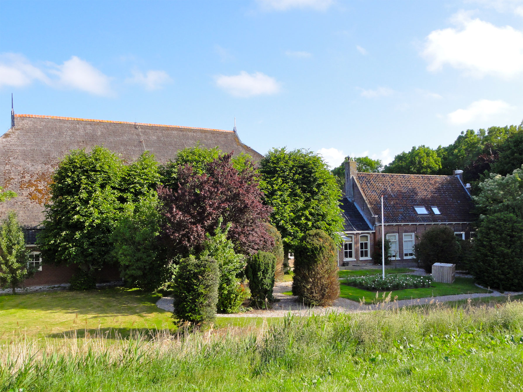 Oudebildtdijk 976 in Sint-Jacobiparochie